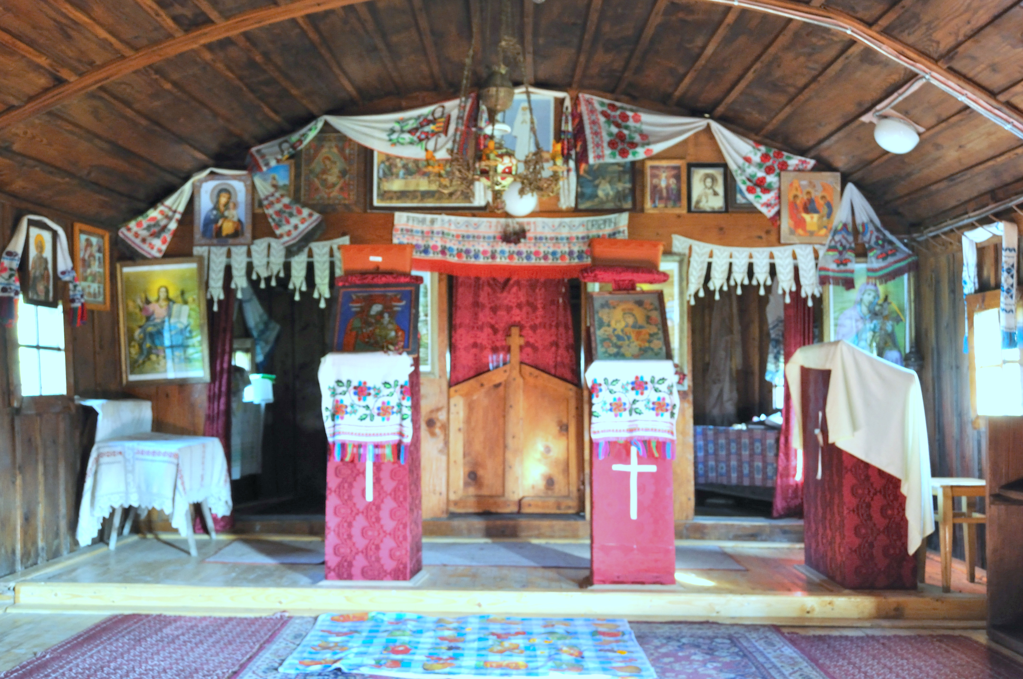 Biserica de lemn „Pogorârea Sântului Duh”, sat Boia Bârzii, Hunedoara